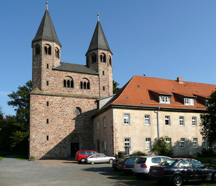 Kloster Bursfelde